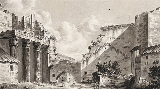 Blick auf das Augustusforum in Rom mit der Ruine des Mars Ultor-Tempels, brush and pen and ink with wash on paper (3 x 5.4 in. / 7.7 x 13.7 cm), 1829 -, Signed, Inscribed